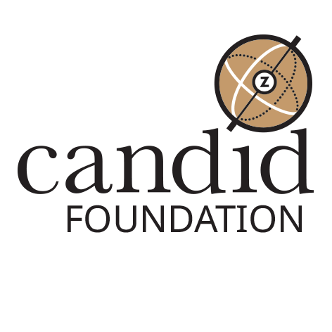 Logo der Candid Foundation gGmbH, einer Denkfabrik in Berlin